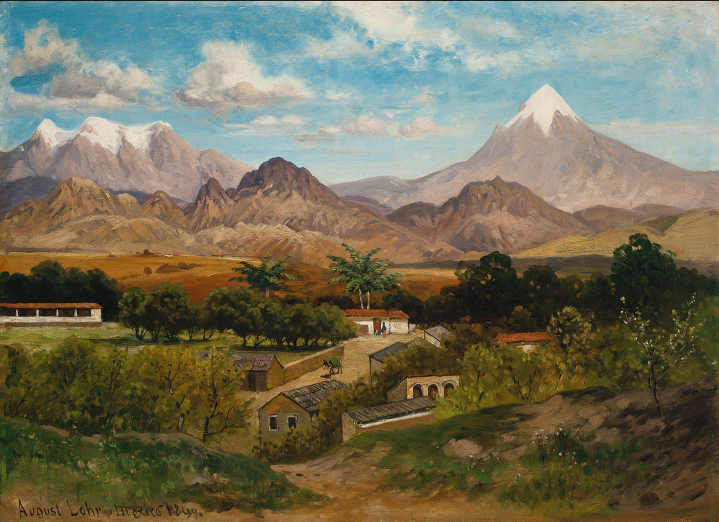 Vista de Cuernavaca con los volcanes Popocatépetl e Iztaccíhuatl